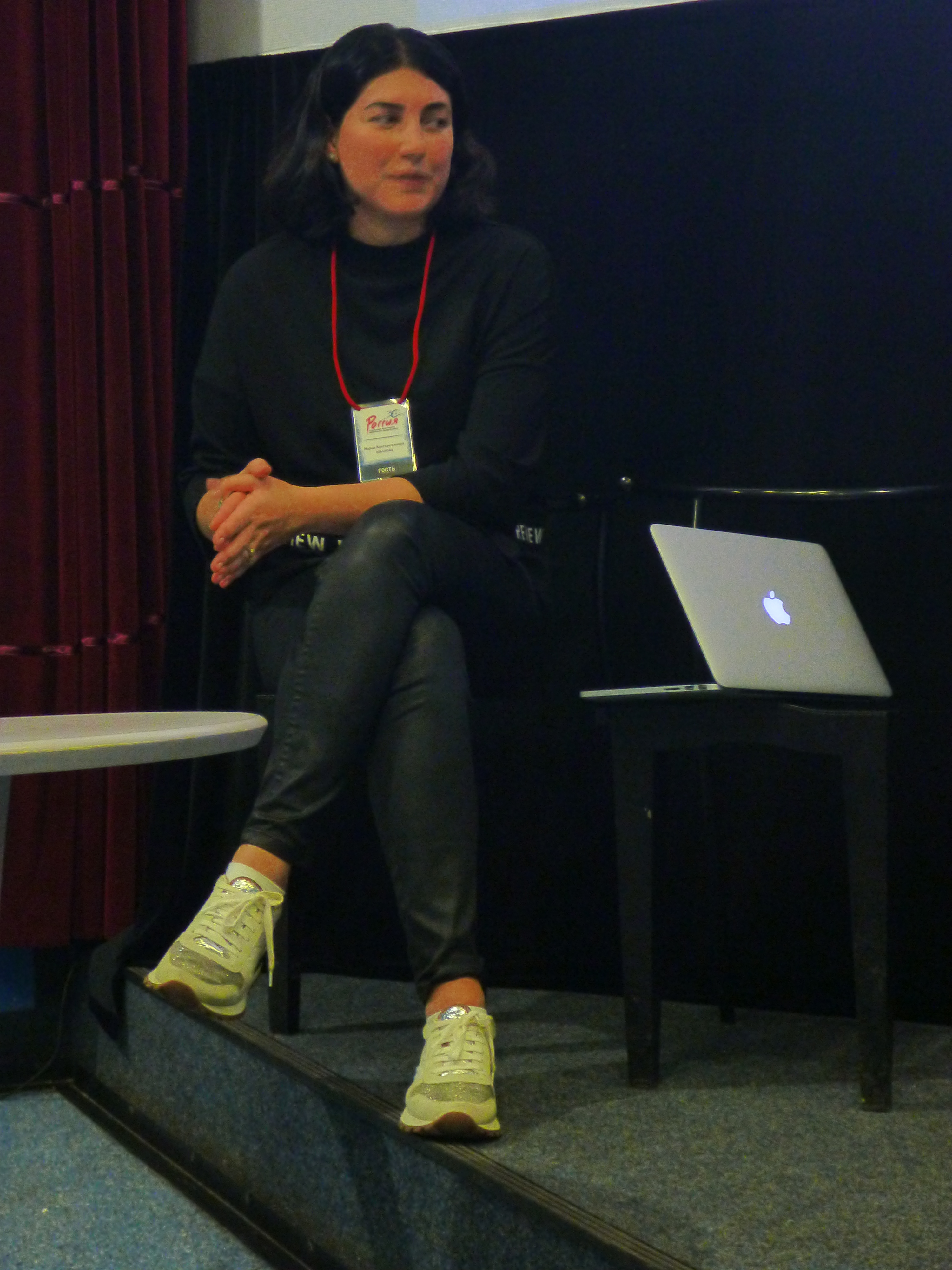 Генеральный директор Grant Buro Мария Иванова в Екатеринбурге 2019 год